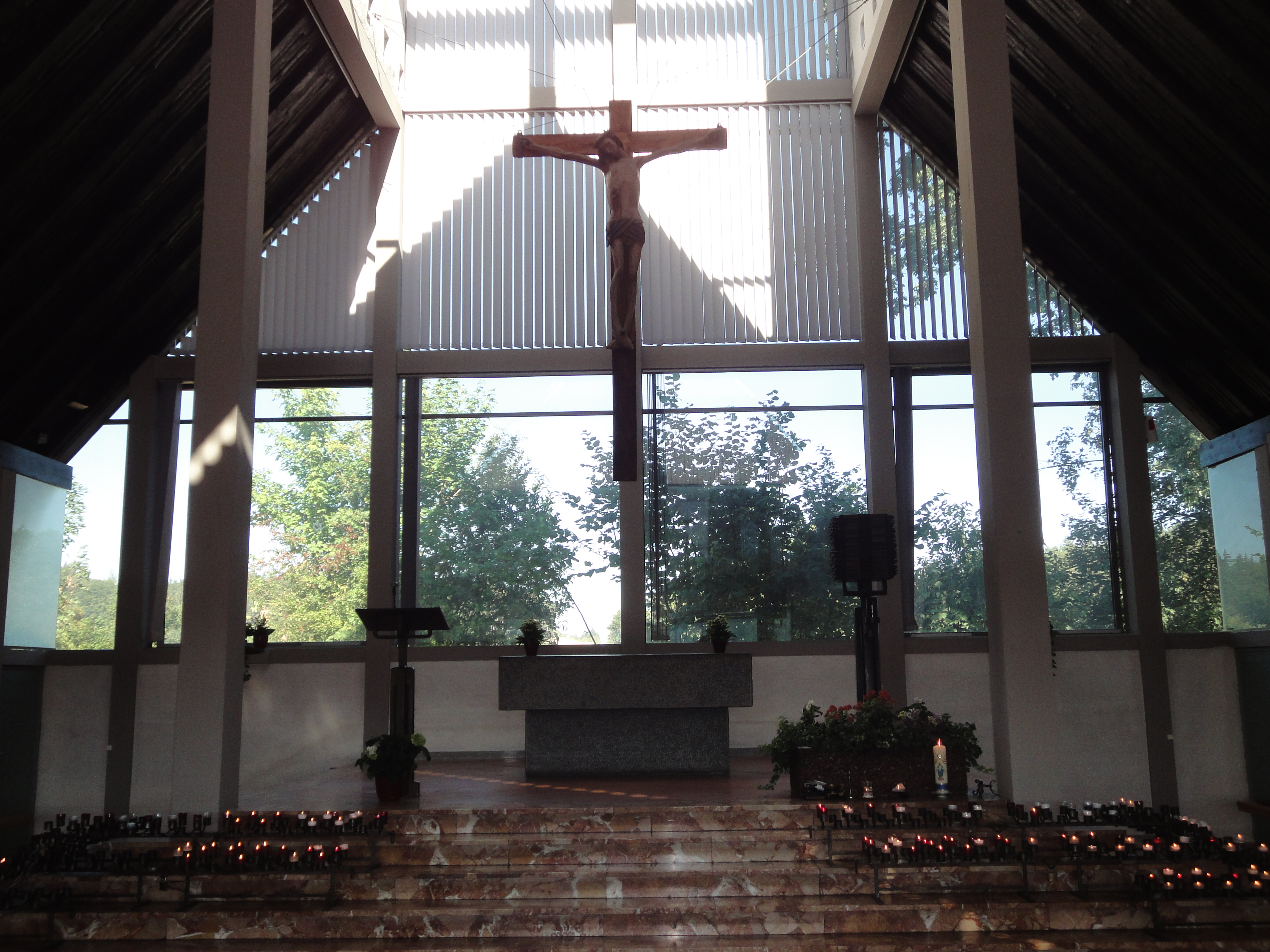 Innenraum der Autobahnkirche Maria, Schutz der Reisenden bei Horgau